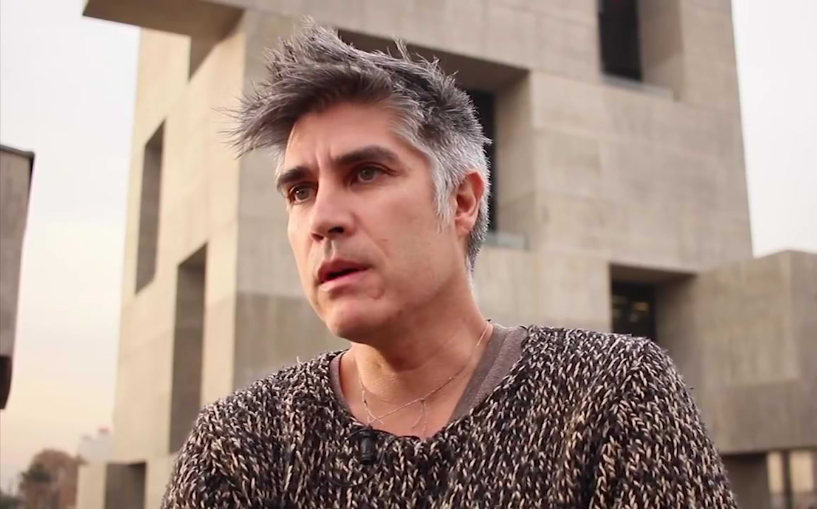 Vídeo sobre Alejandro Aravena con motivo del Premio Abdón Cifuentes 2015